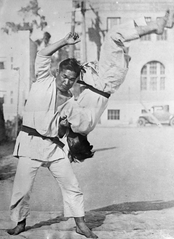 Ein Jiu-Jitsu-Kampf auf der Strasse ! Der Jiu-Jitsu-Kampf ist der Nationalsport Japans. In den Strassen Tokios und anderer japanischer Städte kann man derartige Kämpfe des Oefteren beobachten.